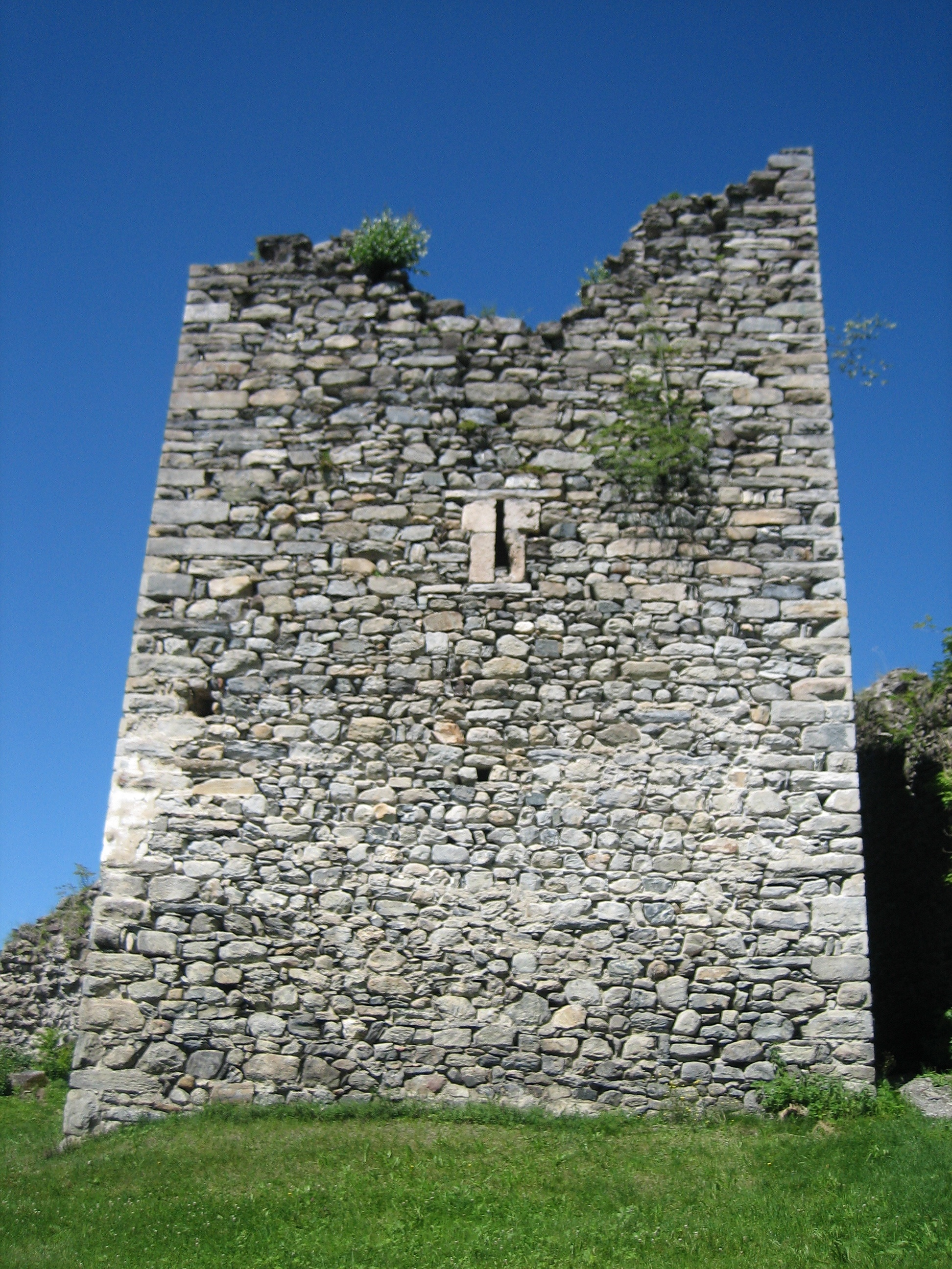 Osteseite des Turms